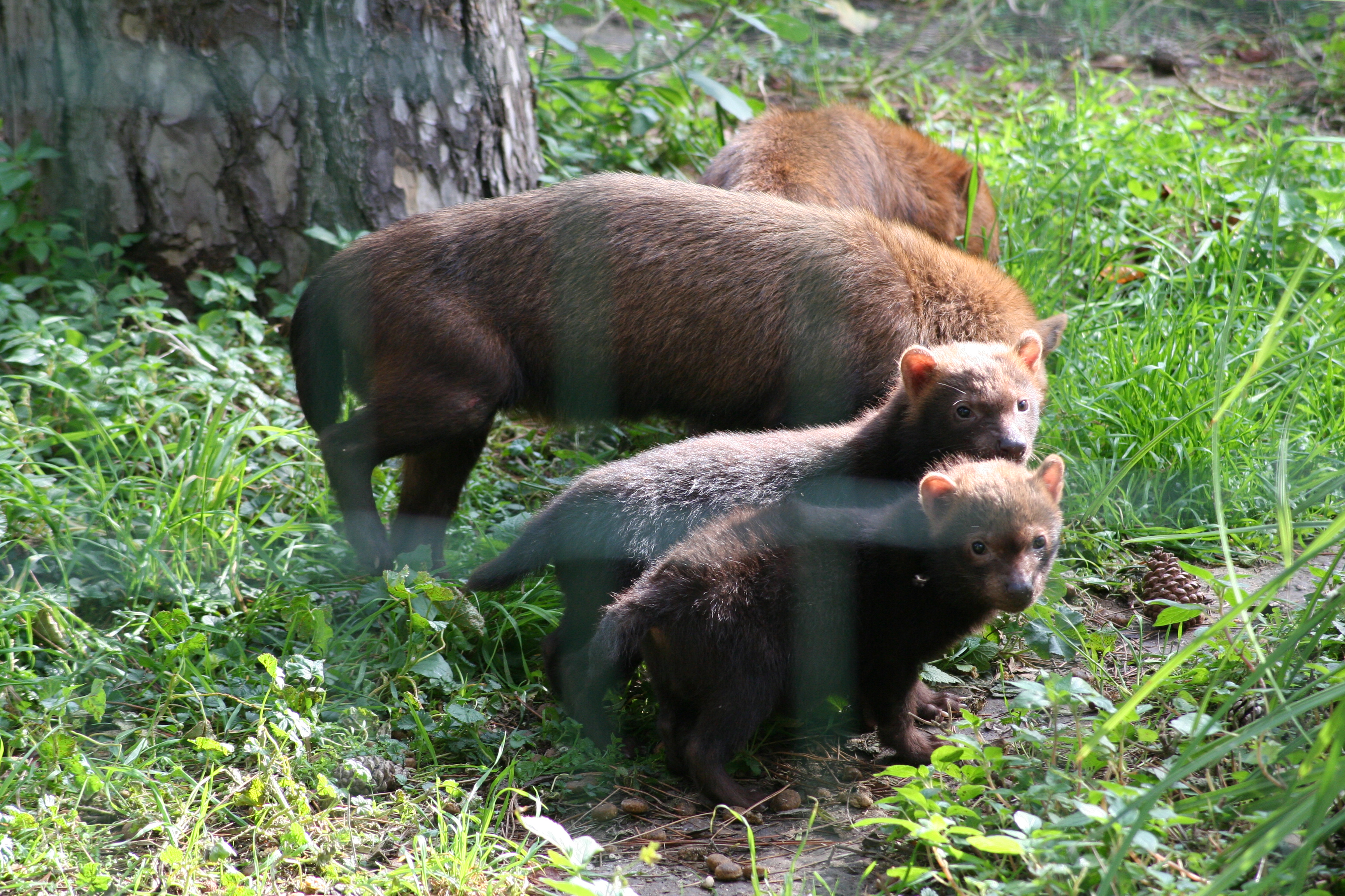 Chiens de buissons (Speothos venaticus). Photo prise au Jardin des Plantes. Paris octobre 2006